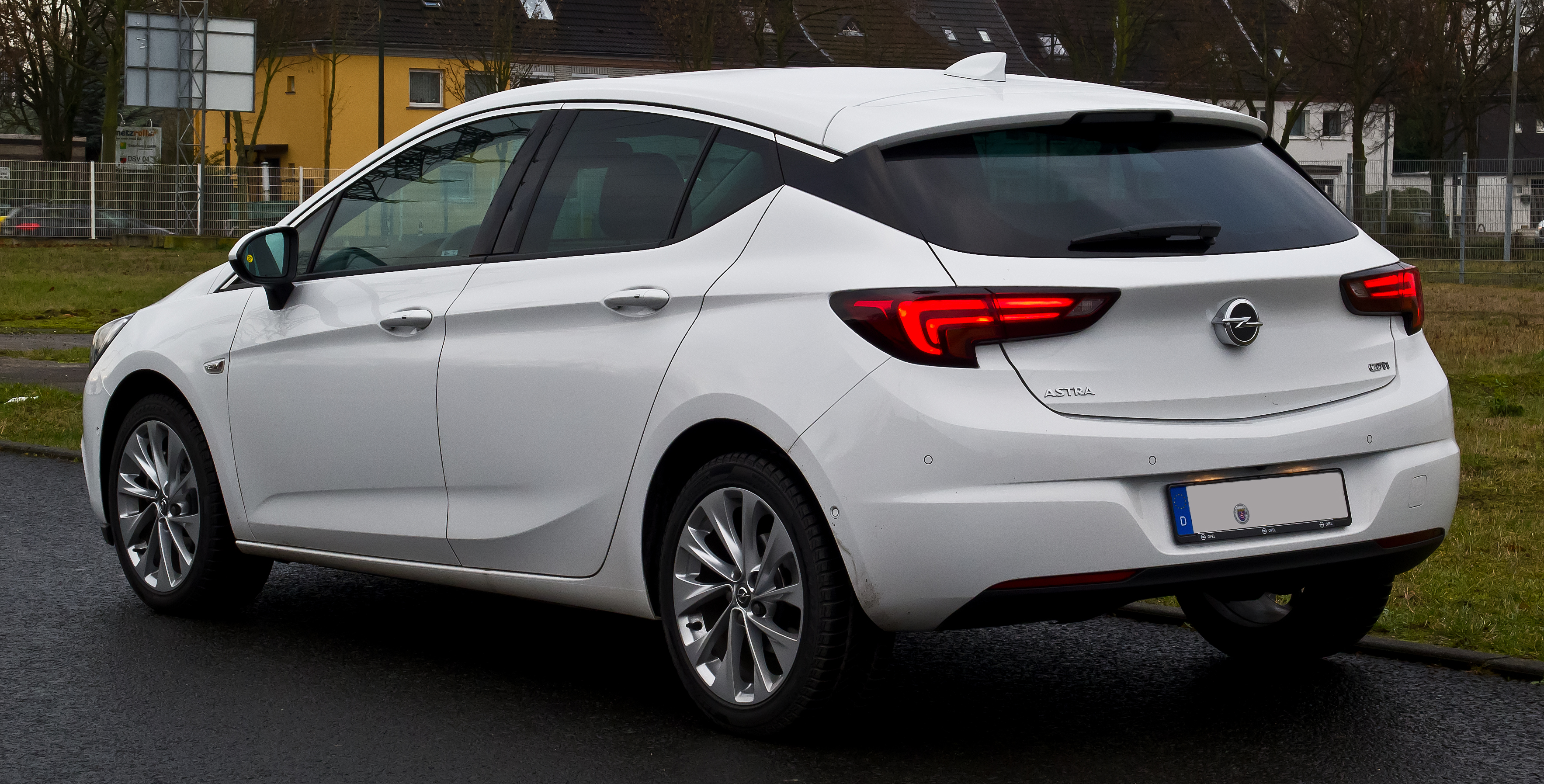 Opel Astra 1.6 CDTI ecoFLEX Dynamic (K)